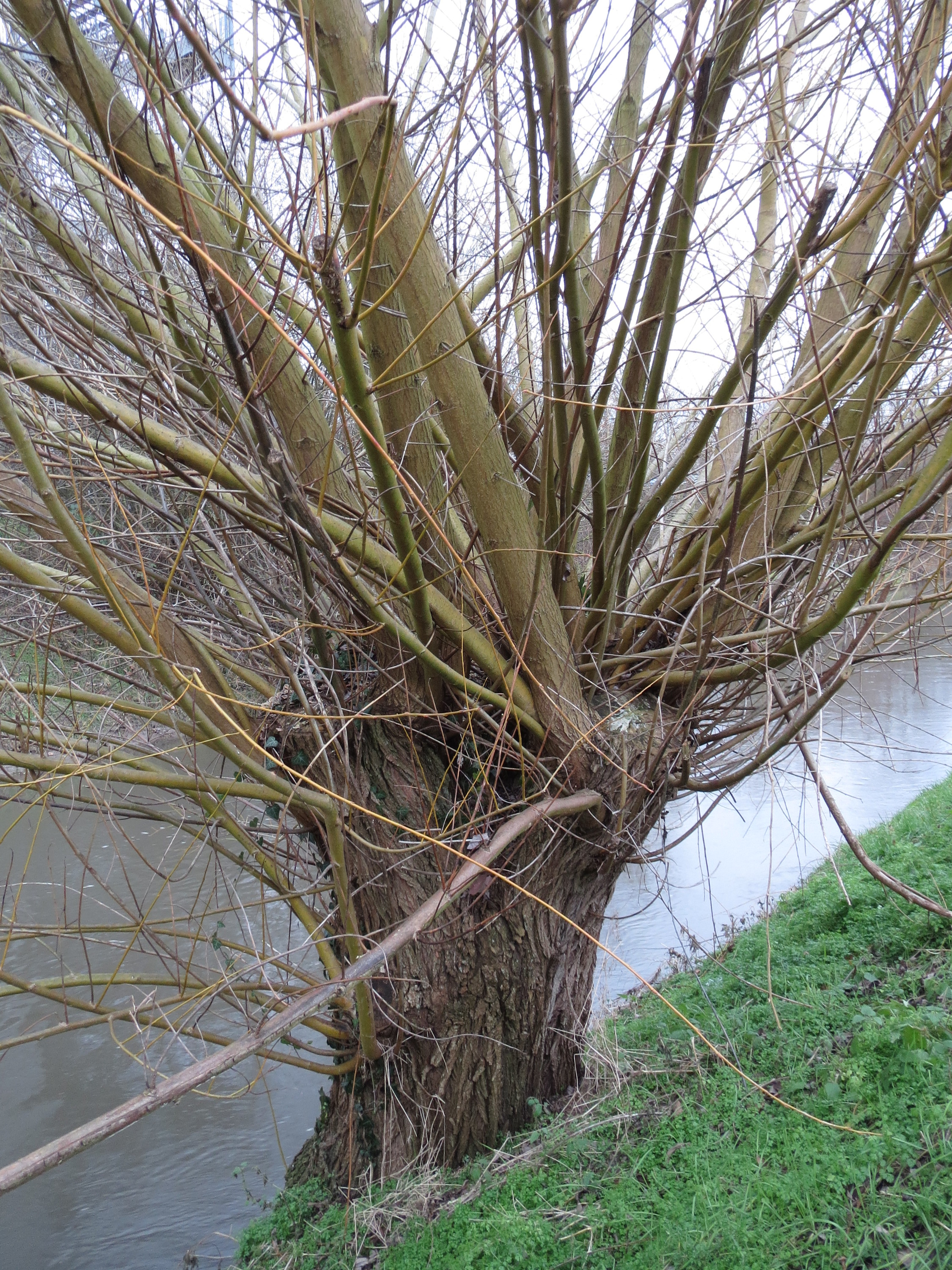 Kopf-Weide (Salix alba) am Kraichbach in Hockenheim